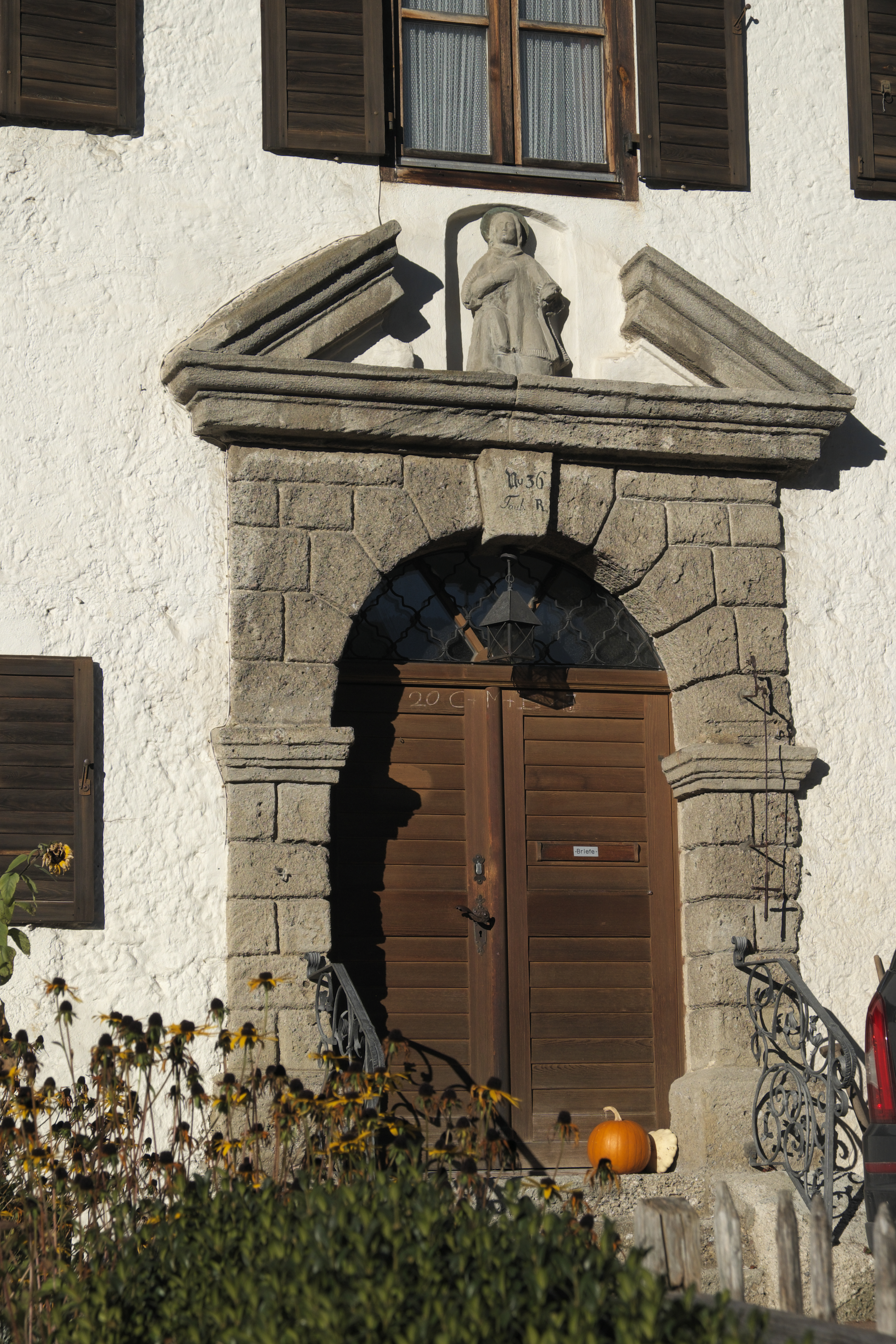 Pfarrhof in Ramsau bei Berchtesgaden im Landkreis Berchtesgadener Land (Bayern/Deutschland)